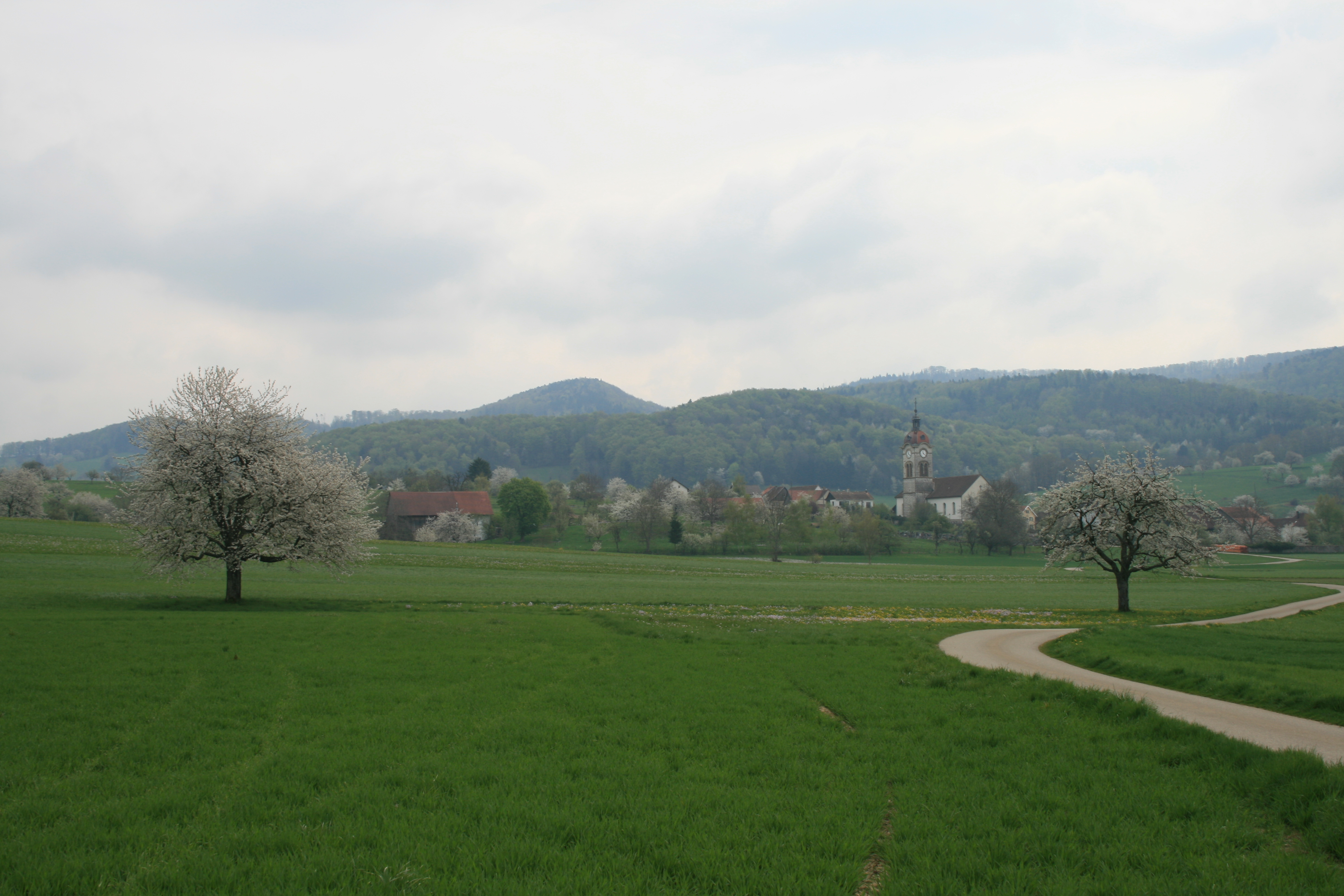 Charmoille JU, Schweiz